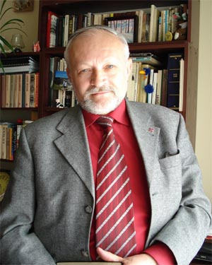 Михайло Слободянюк